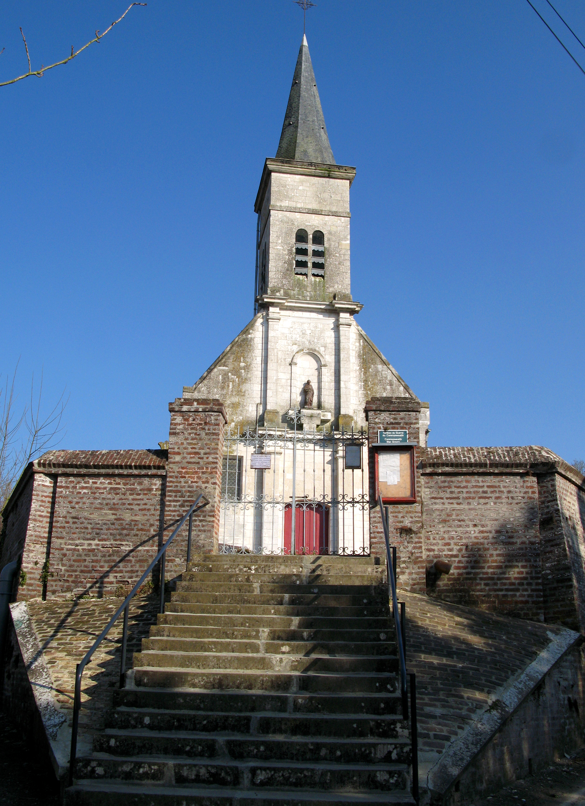 Canaples (Somme, France) - L'église. L'escalier est raide, et on remarque l'importance de la maçonnerie nécessaire pour éviter le ravinement du cimetière.